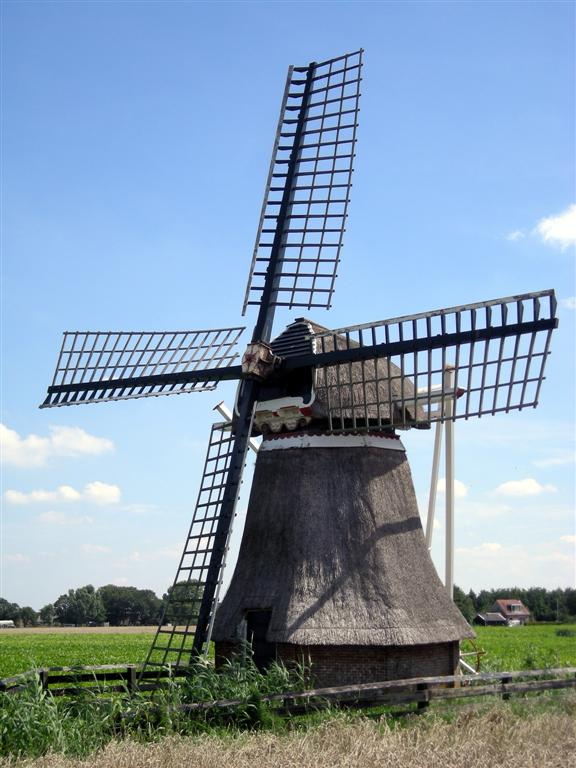 Kleilansmole te Marrum